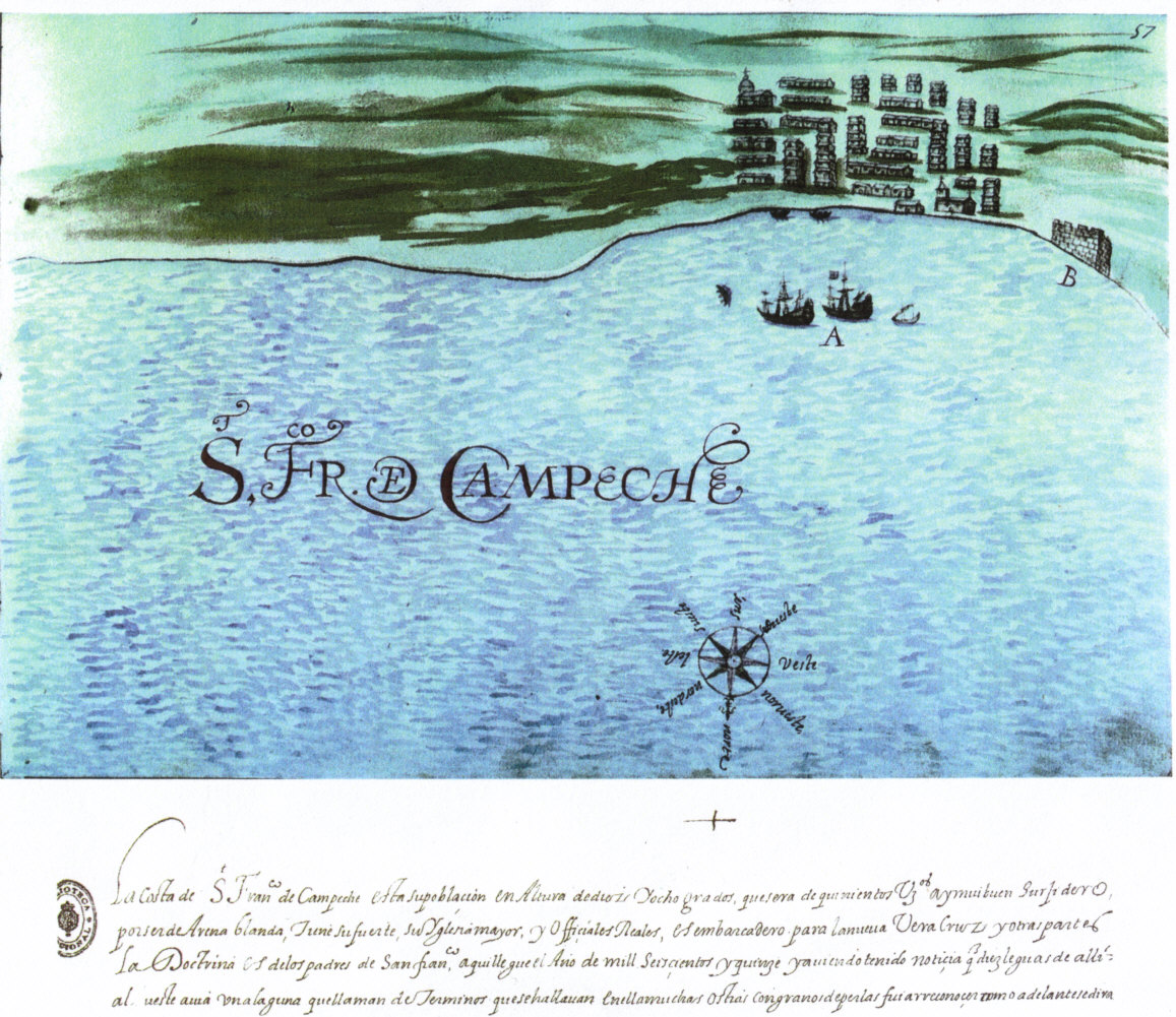 Bahía de Campeche. Cartografía original de Nicolás Cardona, Siglo XVII. Archivo de Indias, Sevilla, España. Escaneada por Usuario:Comvaser. Dominio público.